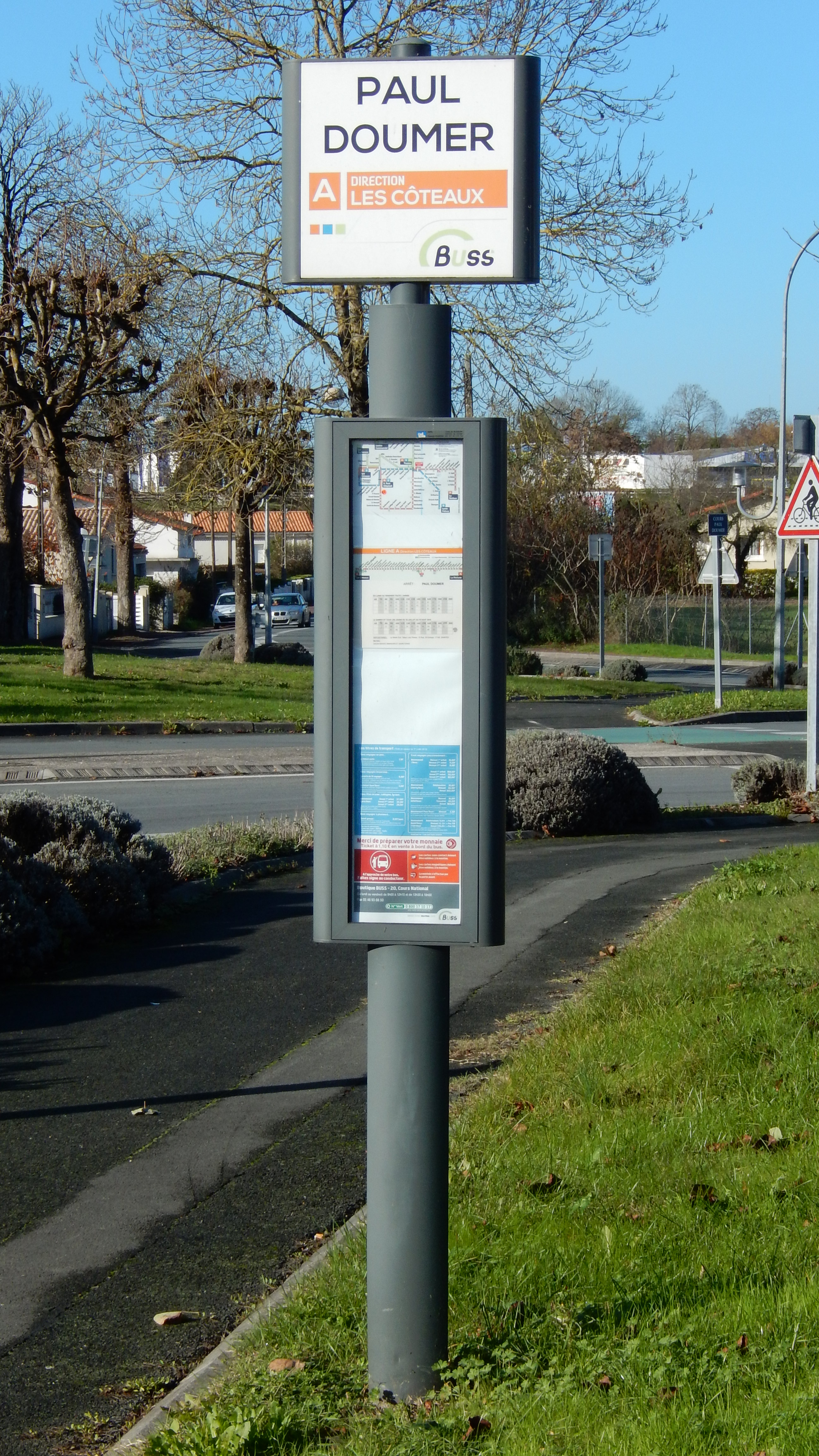 Saintes (Charente-Maritime, France) — Un poteau signalant l'arrêt de bus Paul Doumer, sur la ligne A du réseau Buss.